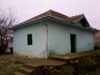 tetqja